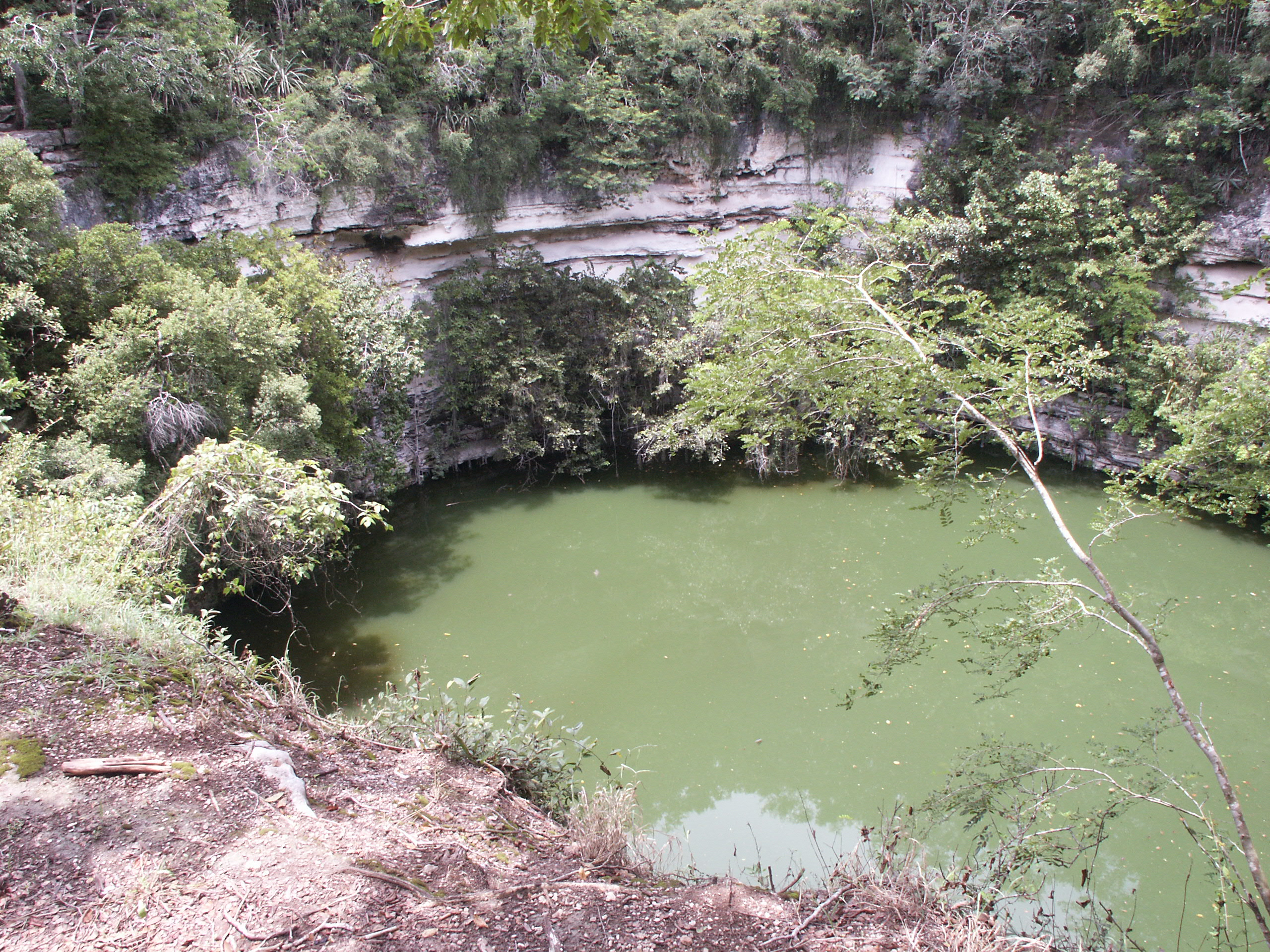 メキシコ、ユカタン半島にある世界遺産チチェン・イッツァの「聖なるセノーテ」